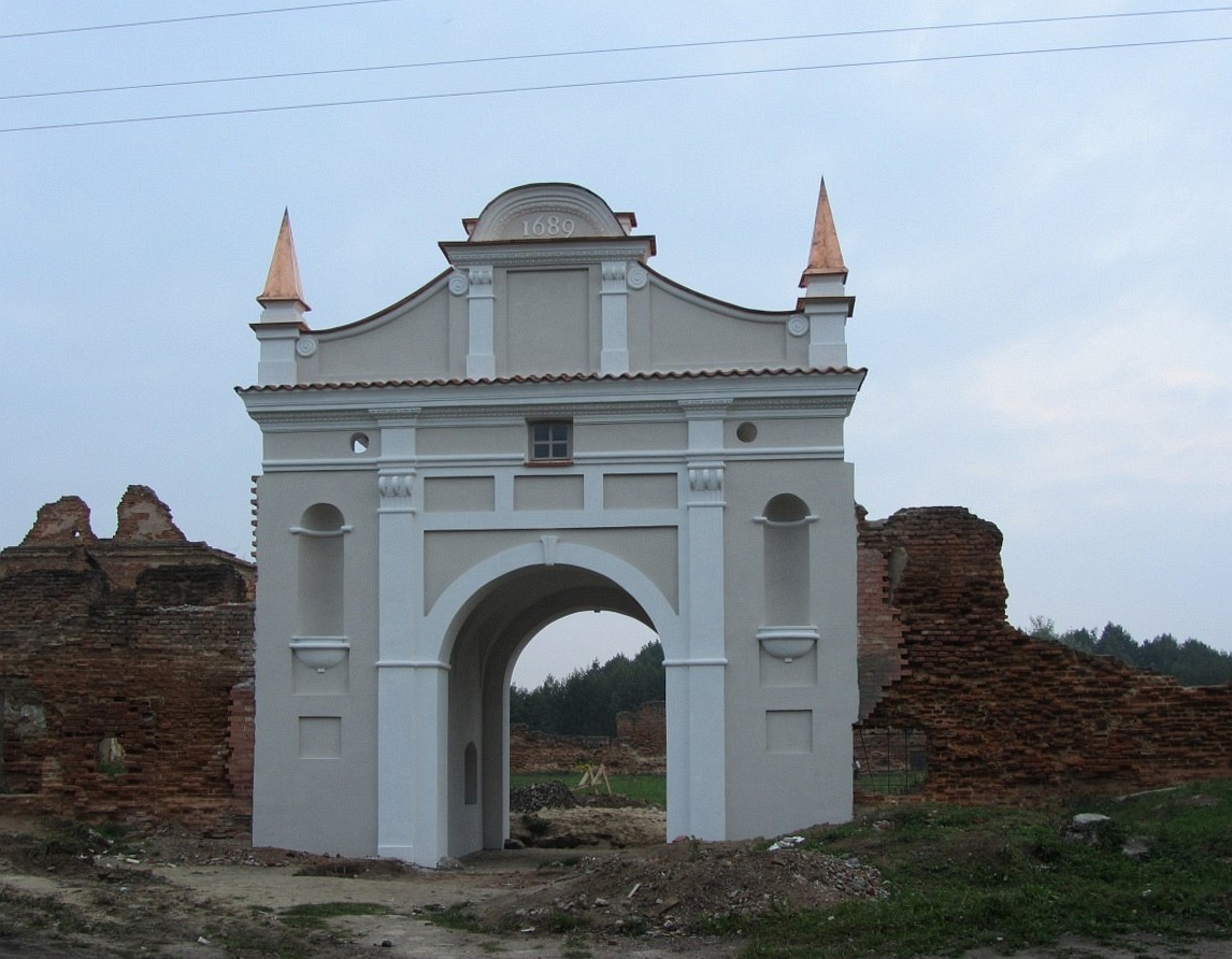 Бяроза. Кляштар